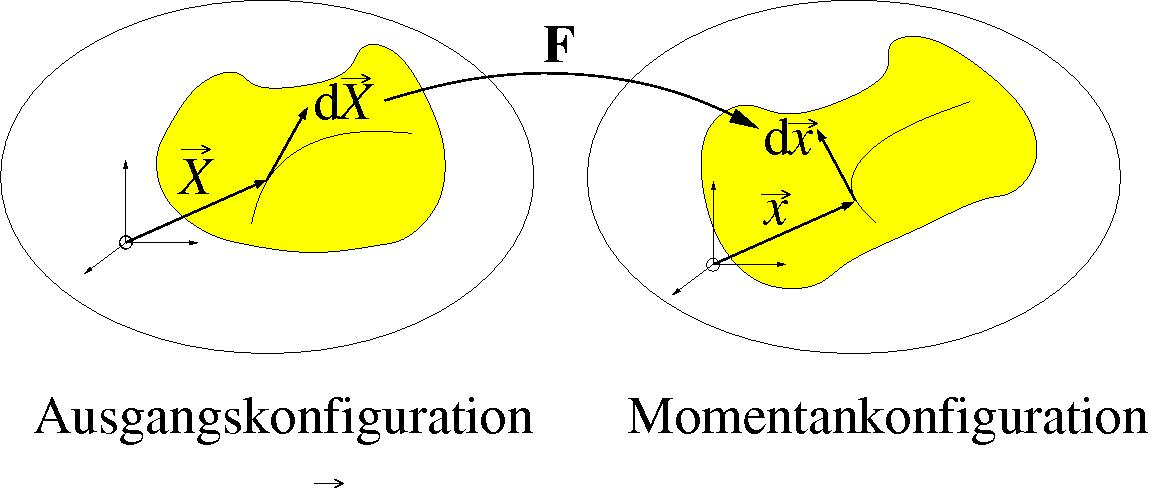 Deformationsgradient